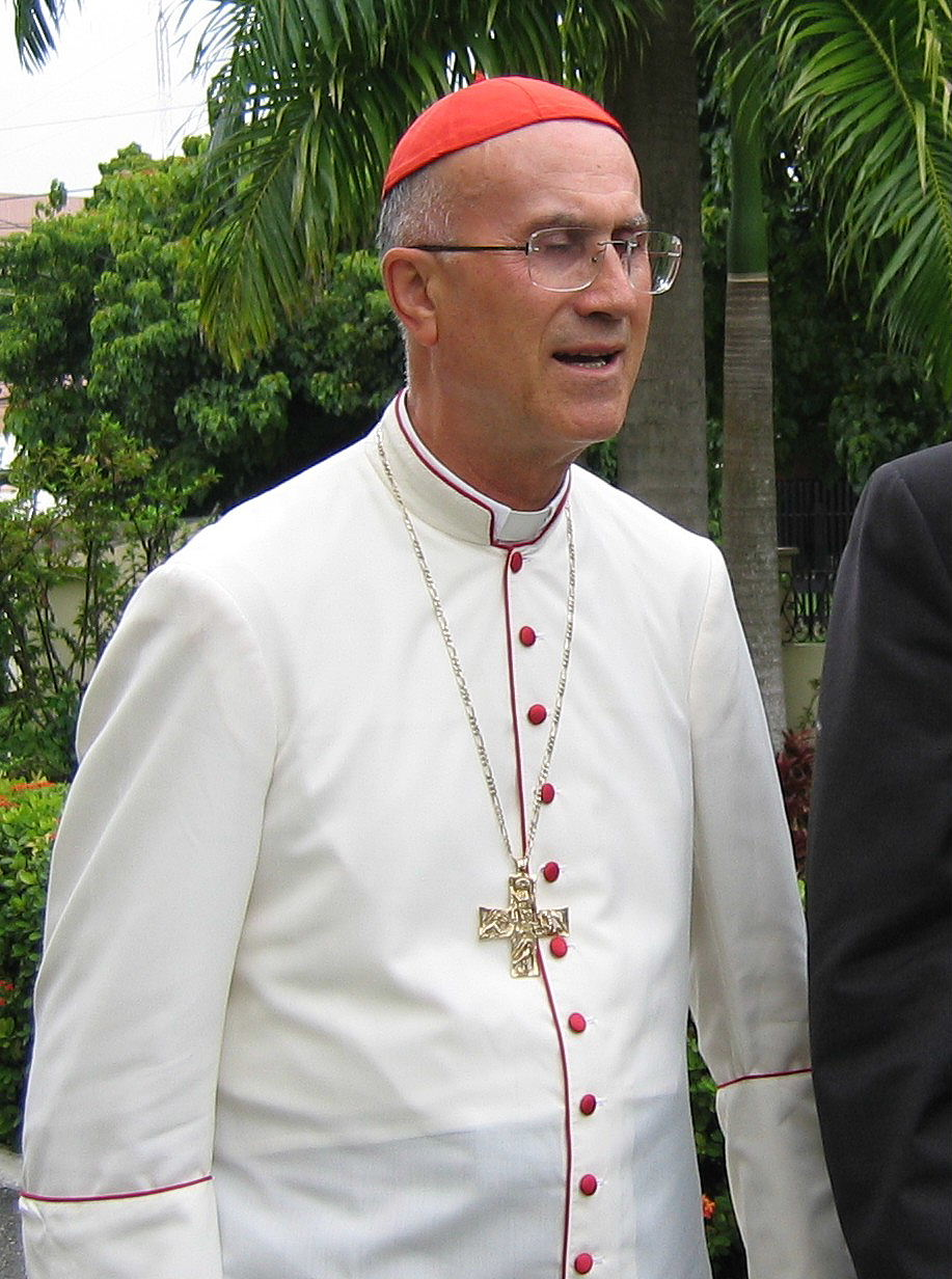 Missione genovese del Guaricano - Santo Domingo (Dominican Republic), l'arcivescovo di Genova cardinale Tarcisio Bertone in visita alla missione - Foto di Donpaolo